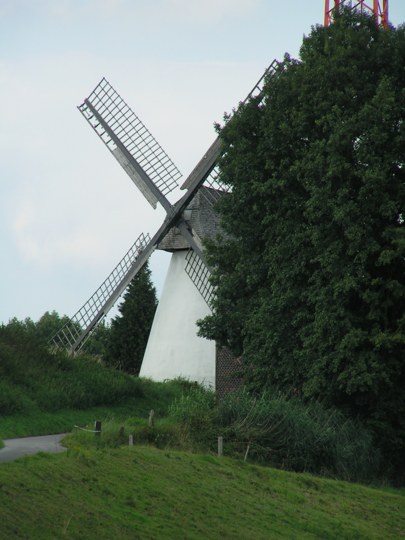 Valentinsmühle Todtenhausen